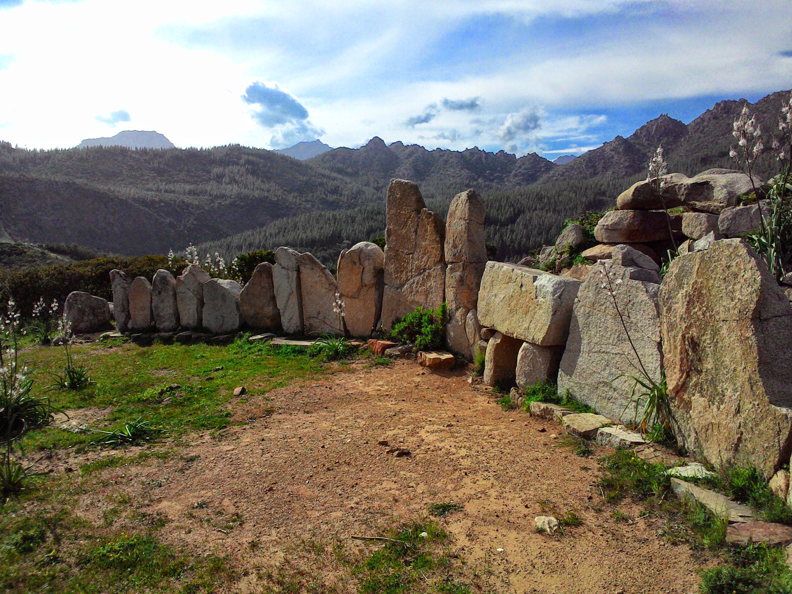 La foto è stata scattata durante il periodo pasquale del 2015 con uno smartphone.